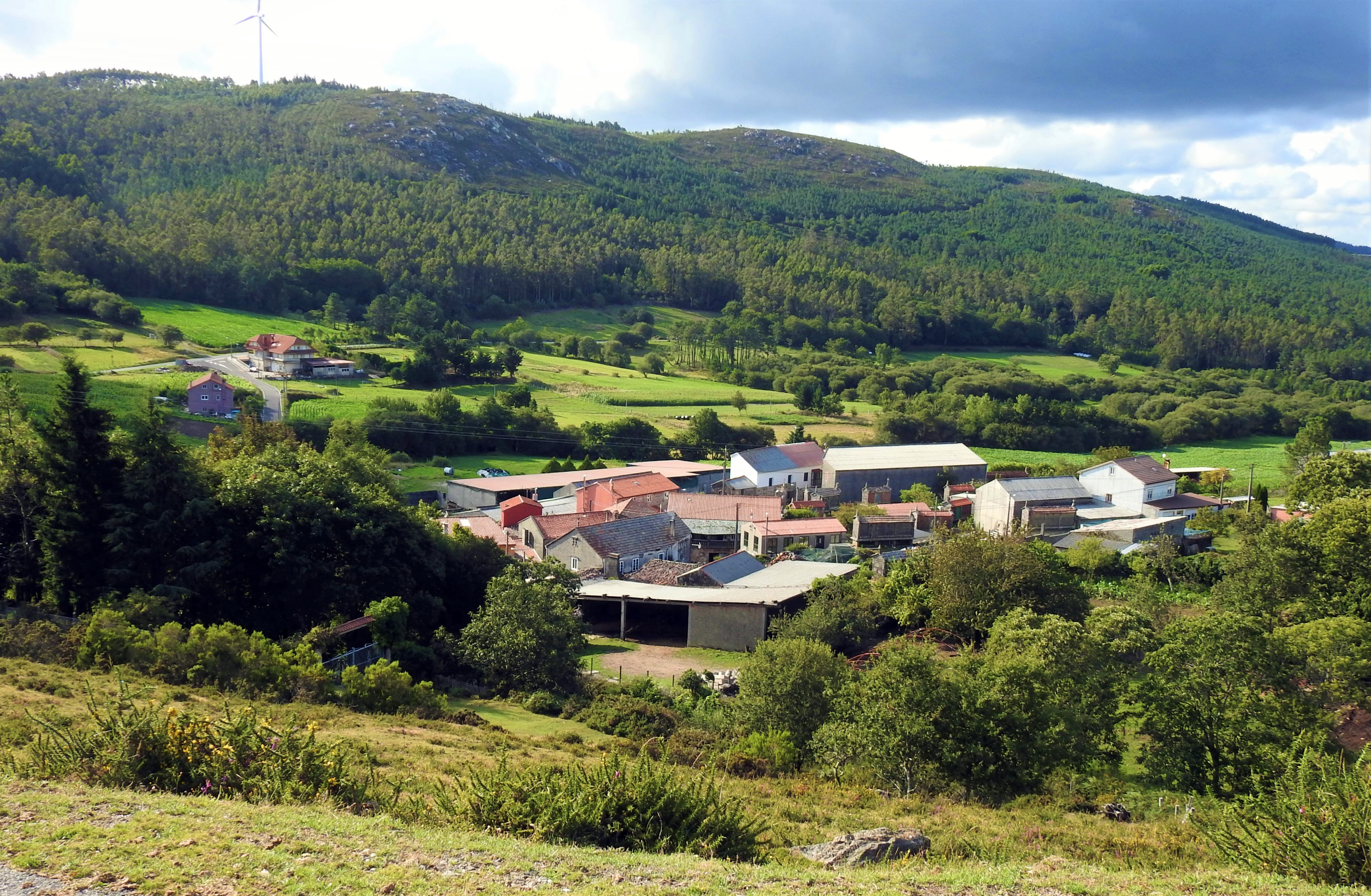 Vista Xeral da aldea de Alderís, Lousame